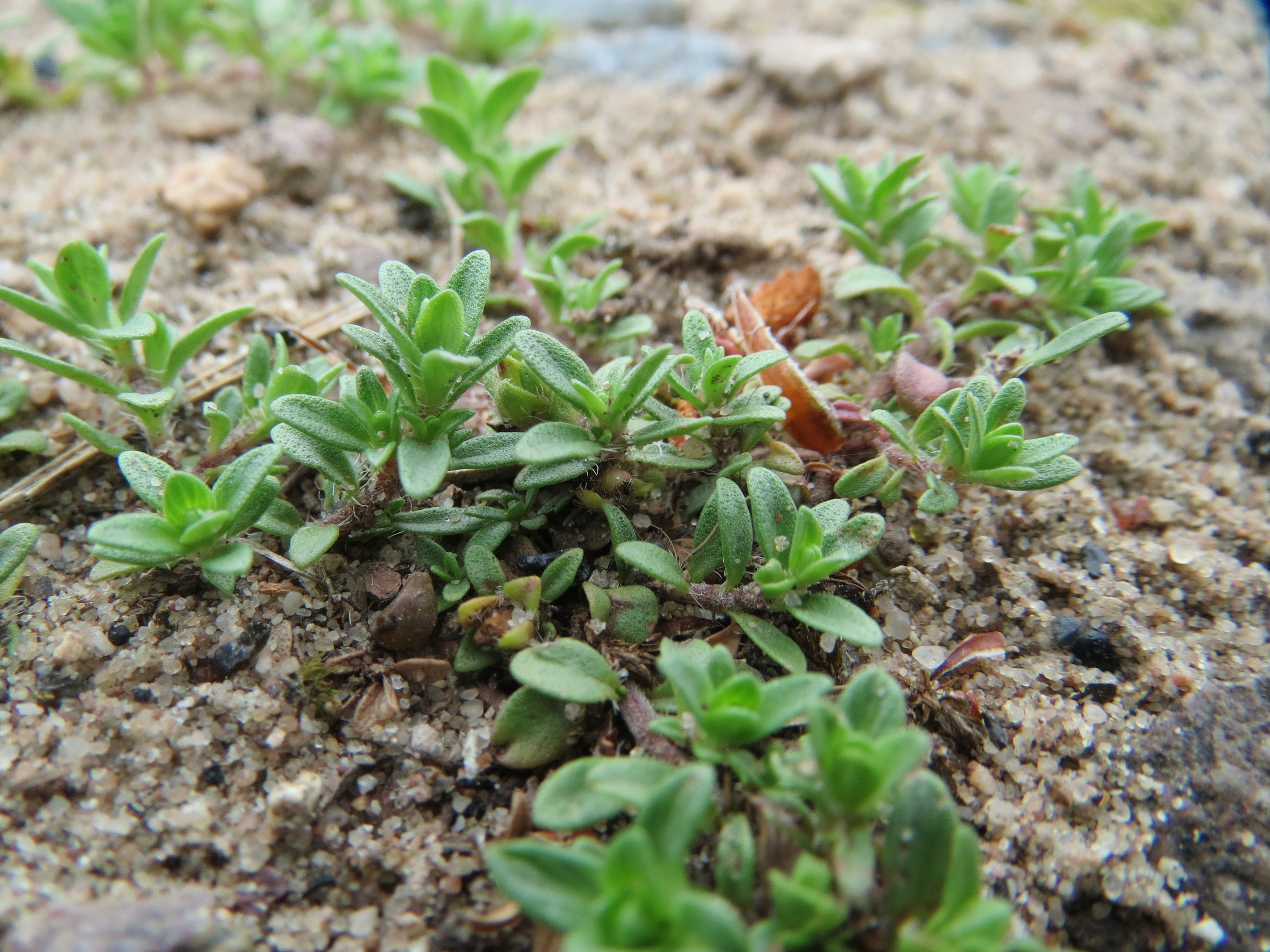 Sand-Thymian (Thymus serpyllum) im Naturschutzgebiet Hirschacker und Dossenwald